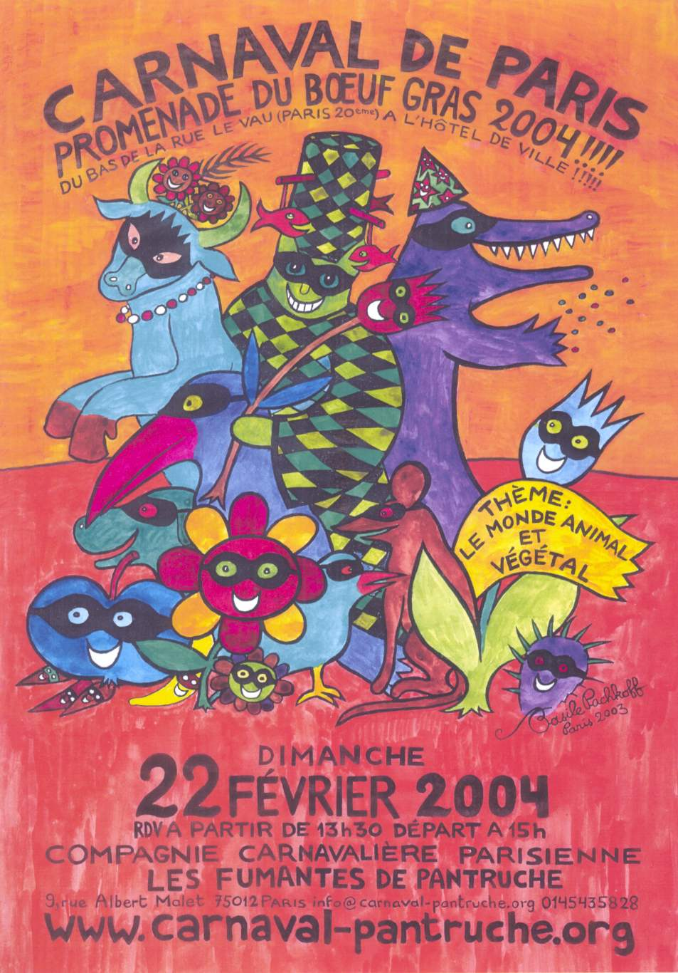 Tract des Fumantes de Pantruche, appelant au Carnaval de Paris 2004, dessiné et colorié à l'aquarelle par son auteur, Basile Pachkoff.